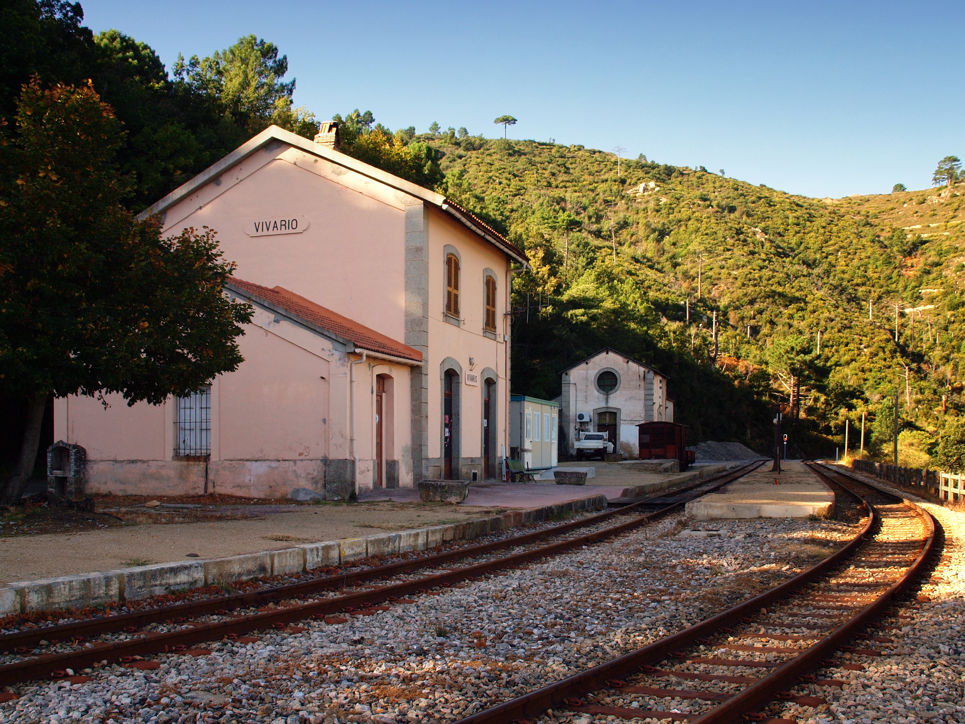 Vivario (Corsica) - La gare